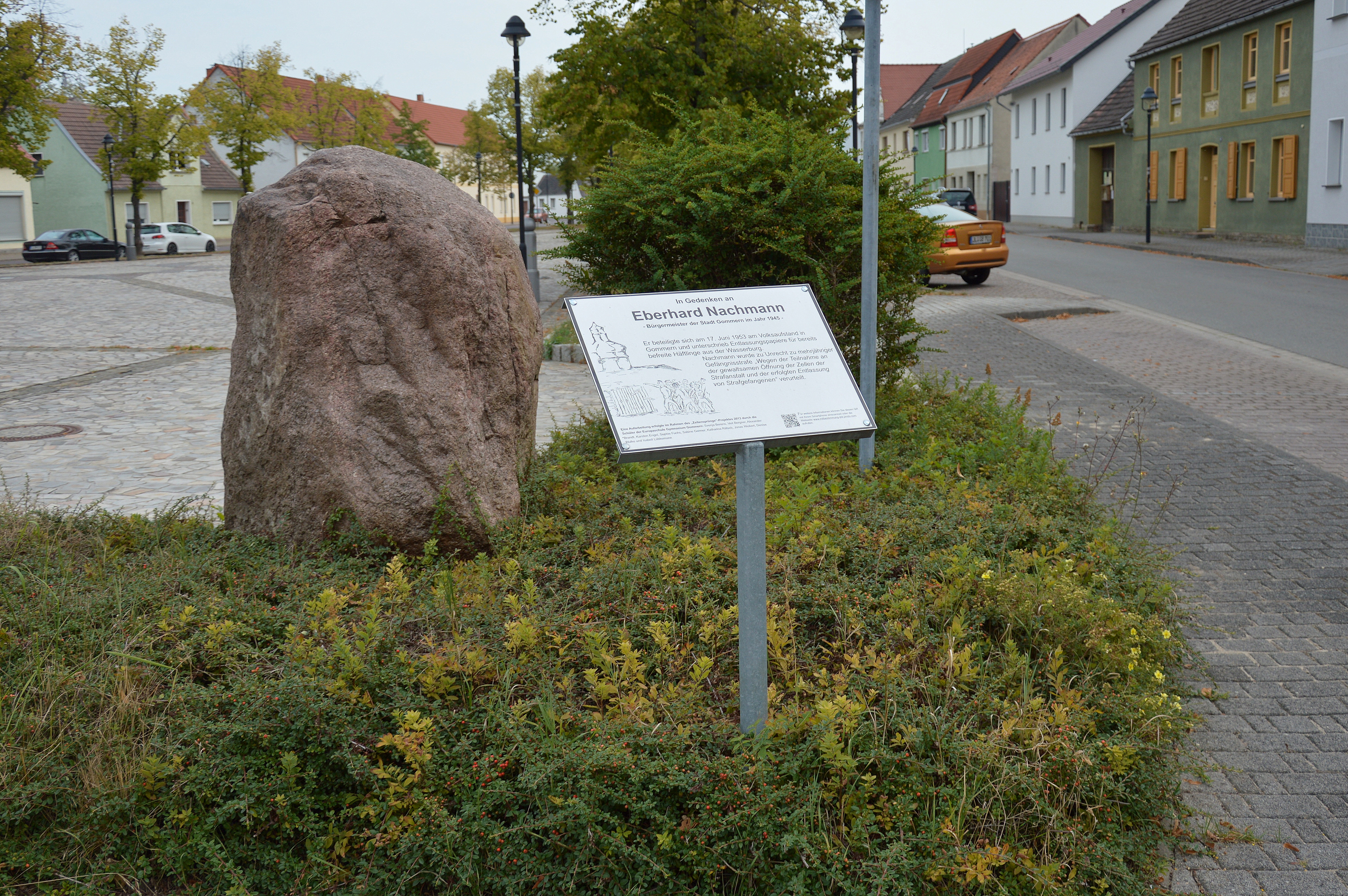 Gedenkstein für Eberhard Nachmann